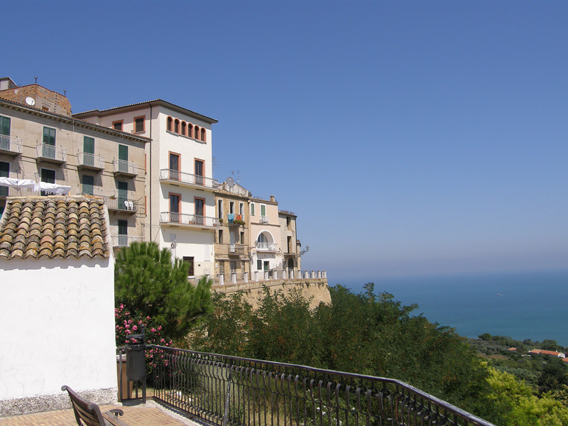 Vasto